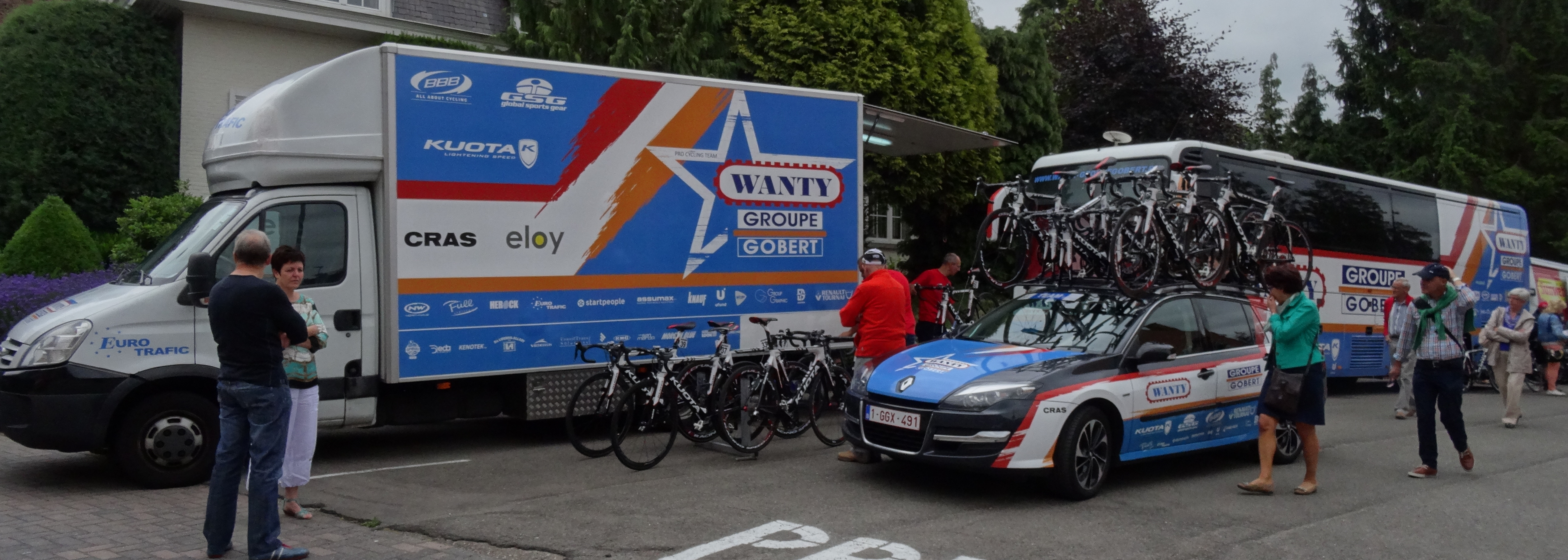 Reportage photographique réalisé le dimanche 15 juin à l'occasion du départ et de l'arrivée du Tour du Limbourg 2014 à Tongres, Belgique.